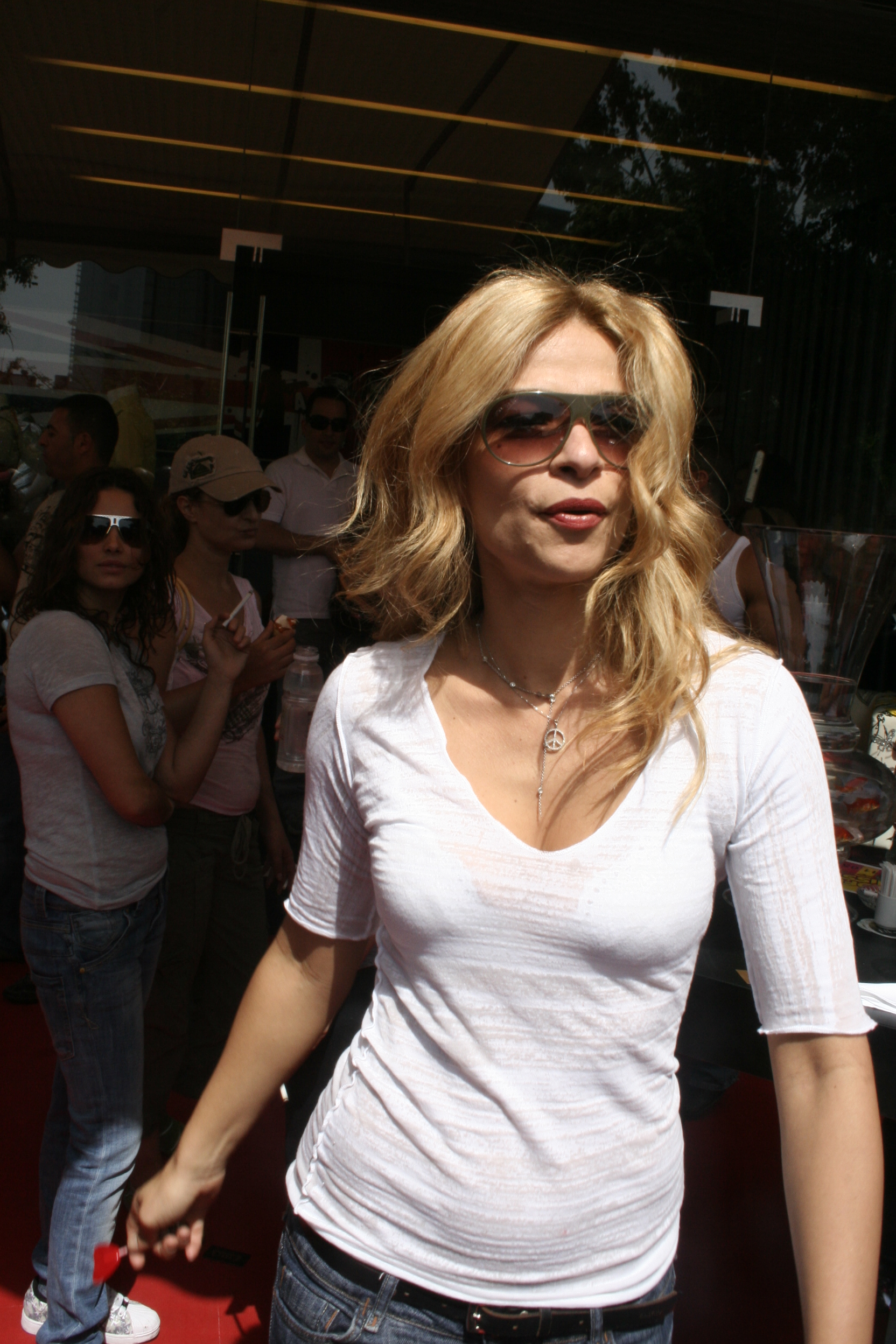 אורנה דץ בשנת 2007 בתל אביב